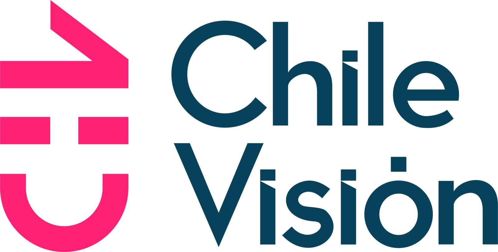 El segundo logo de Chilevisión bajo la administración de Turner